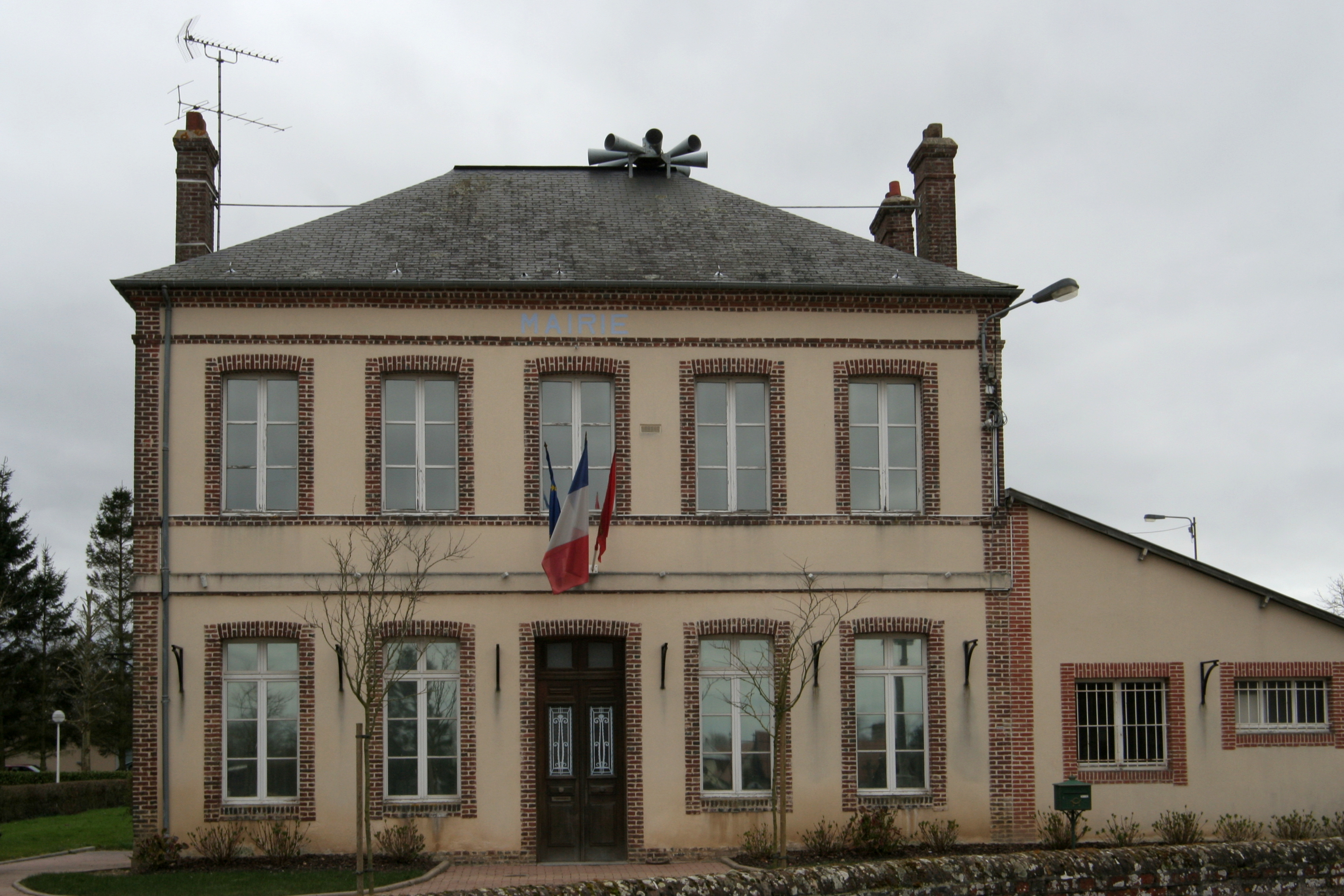 Mairie d'Ablon.